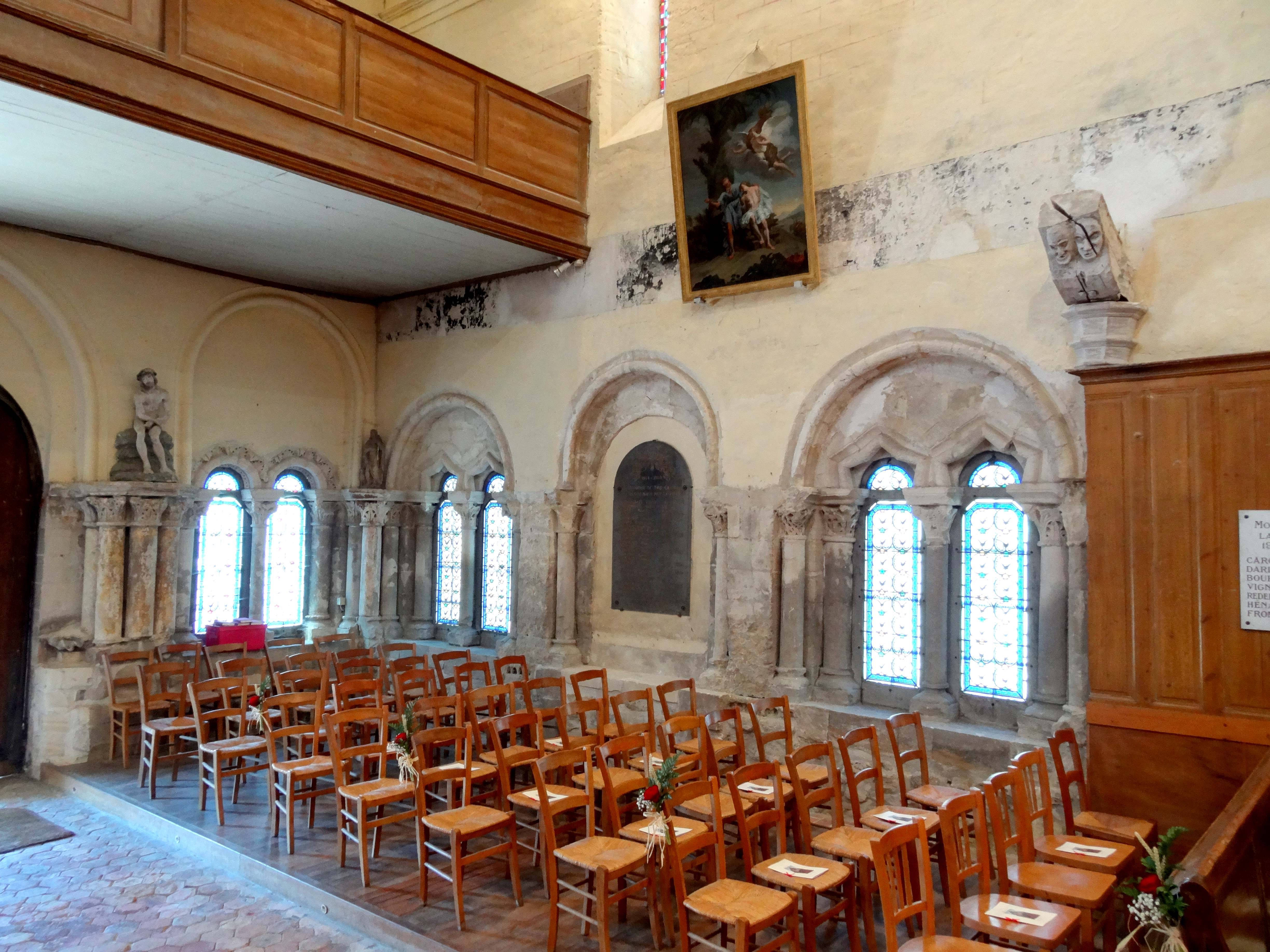 Intérieur de l'église - voir titre.